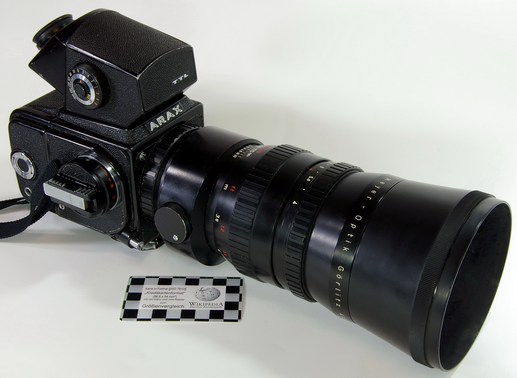 Arax Mittelformatkamera mit Objektiv 300mm/1:4